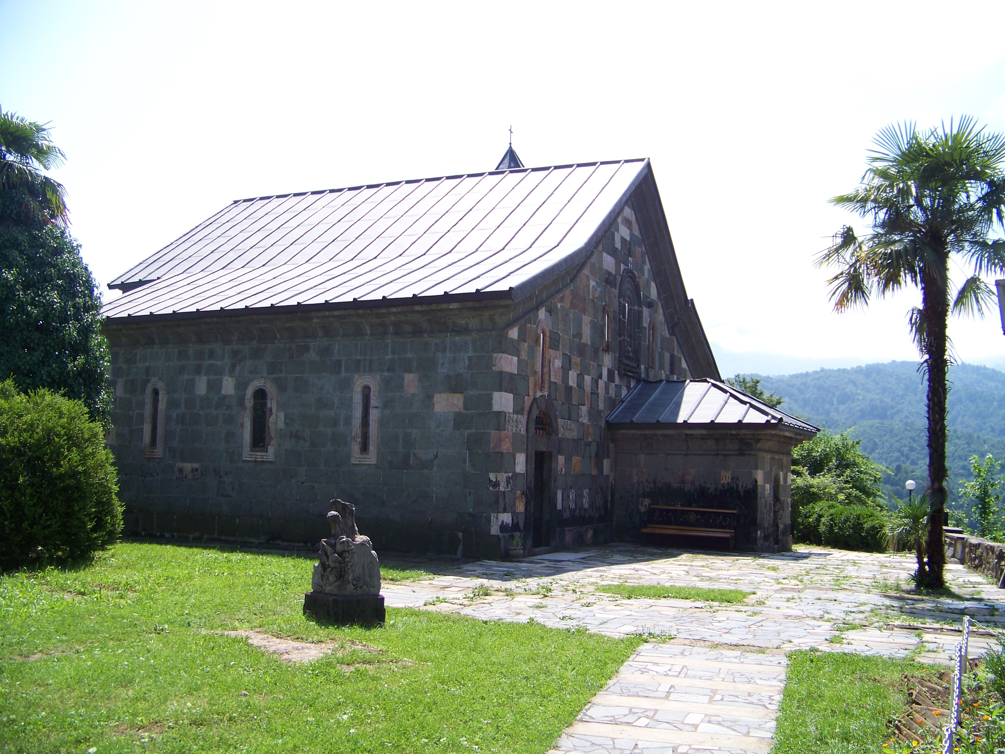 შემოქმედის ტაძარი